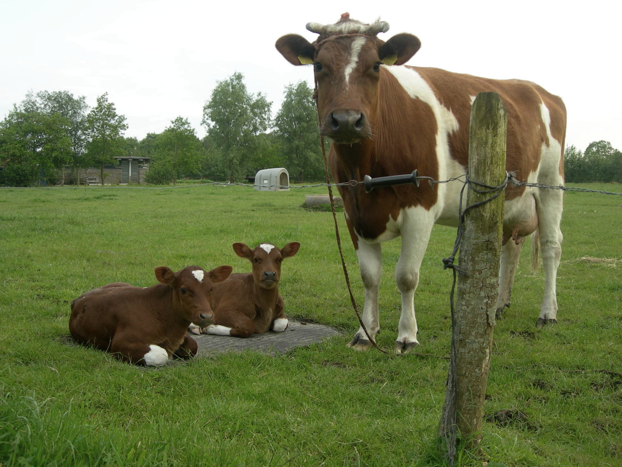 Fries rood bonte tweelingFrysk: Reade Fries twilling